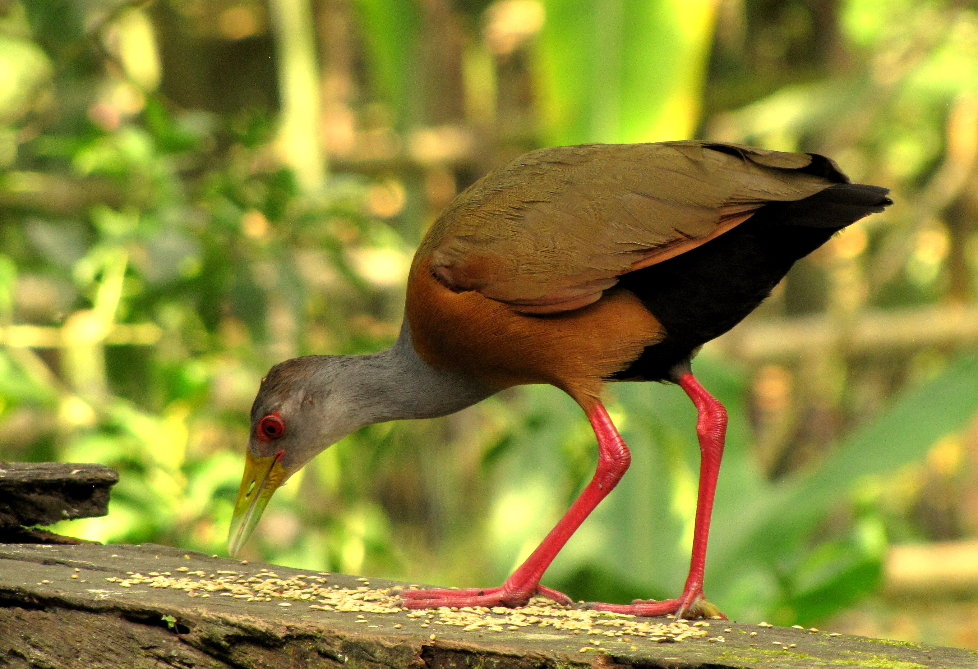 Aramides cajanea (Chilacoa colinegra)